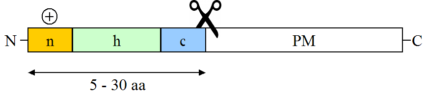 Péptido señal: región N-Terminal hidrófilos (n), región central hidrofobico (h), región C-Terminal (c) Protein: Proteína madurada (PM)